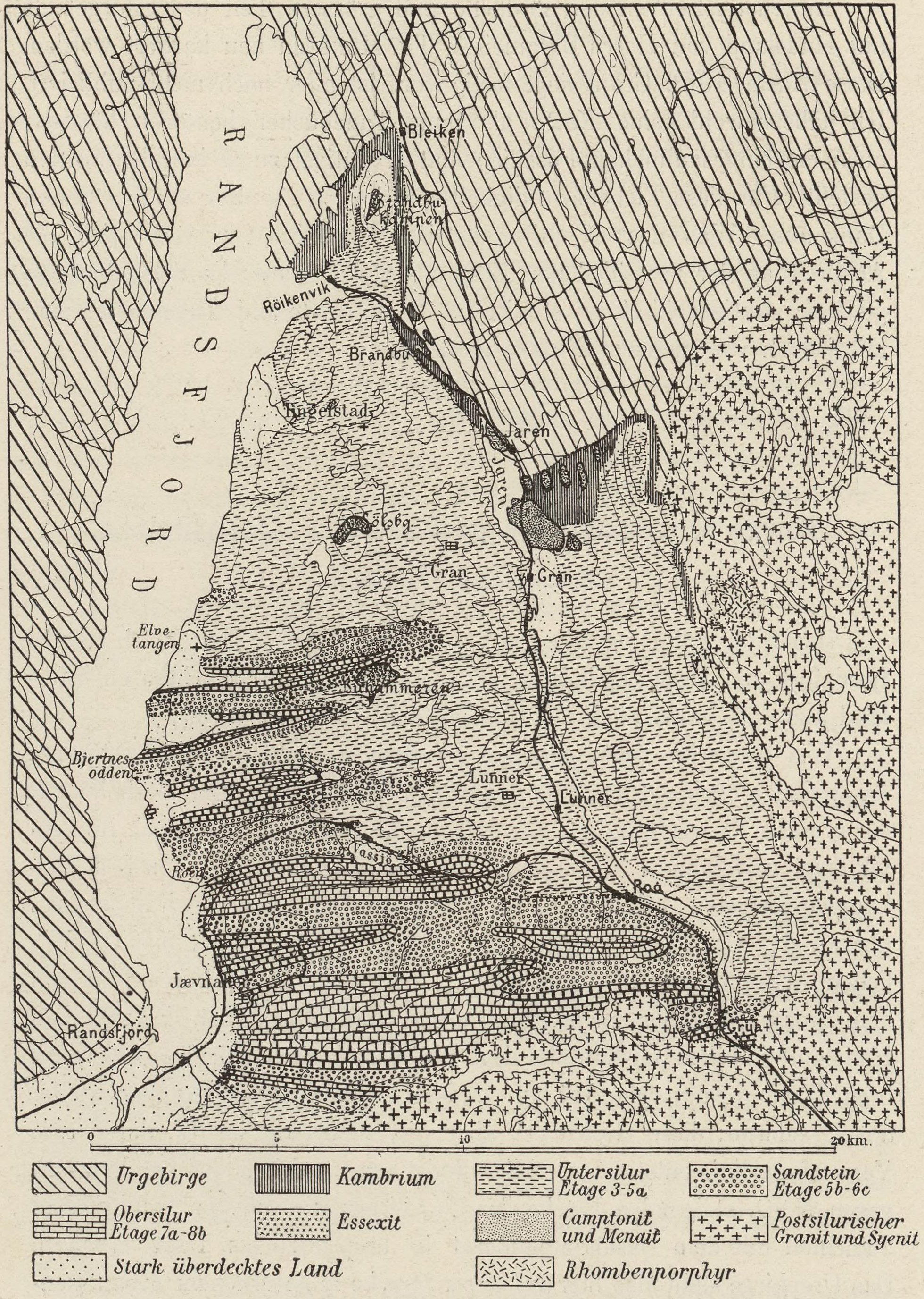 Oversiktskart over oversiluren på Hadeland.